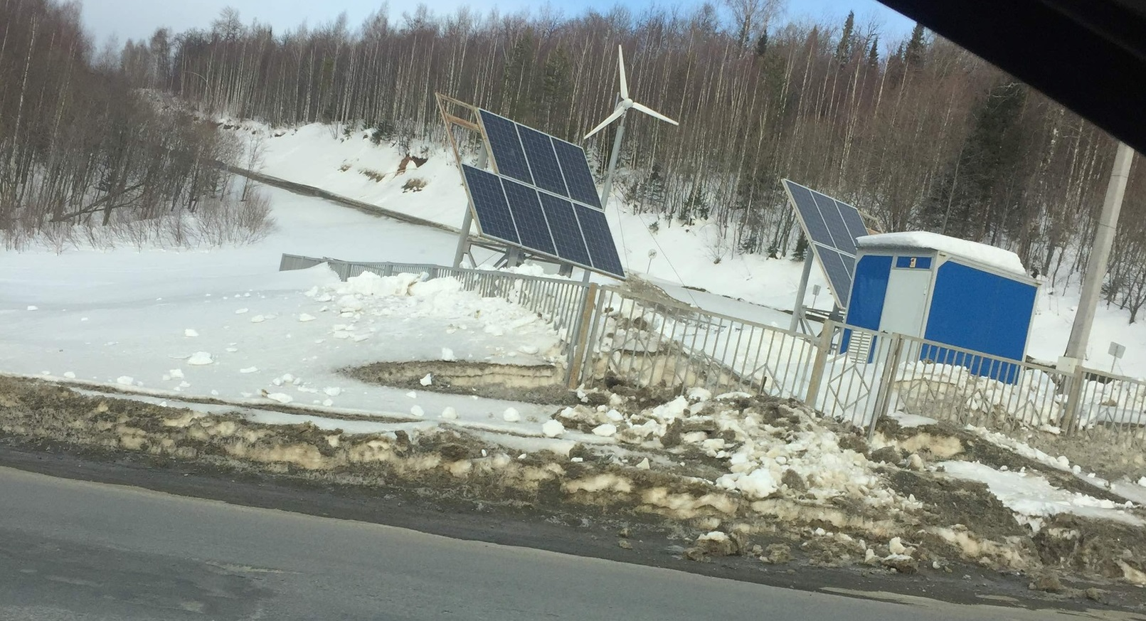 Серпантин на Зильмардаке - Елмерҙәк бөгөлө (Тещин язык). Башкортостан